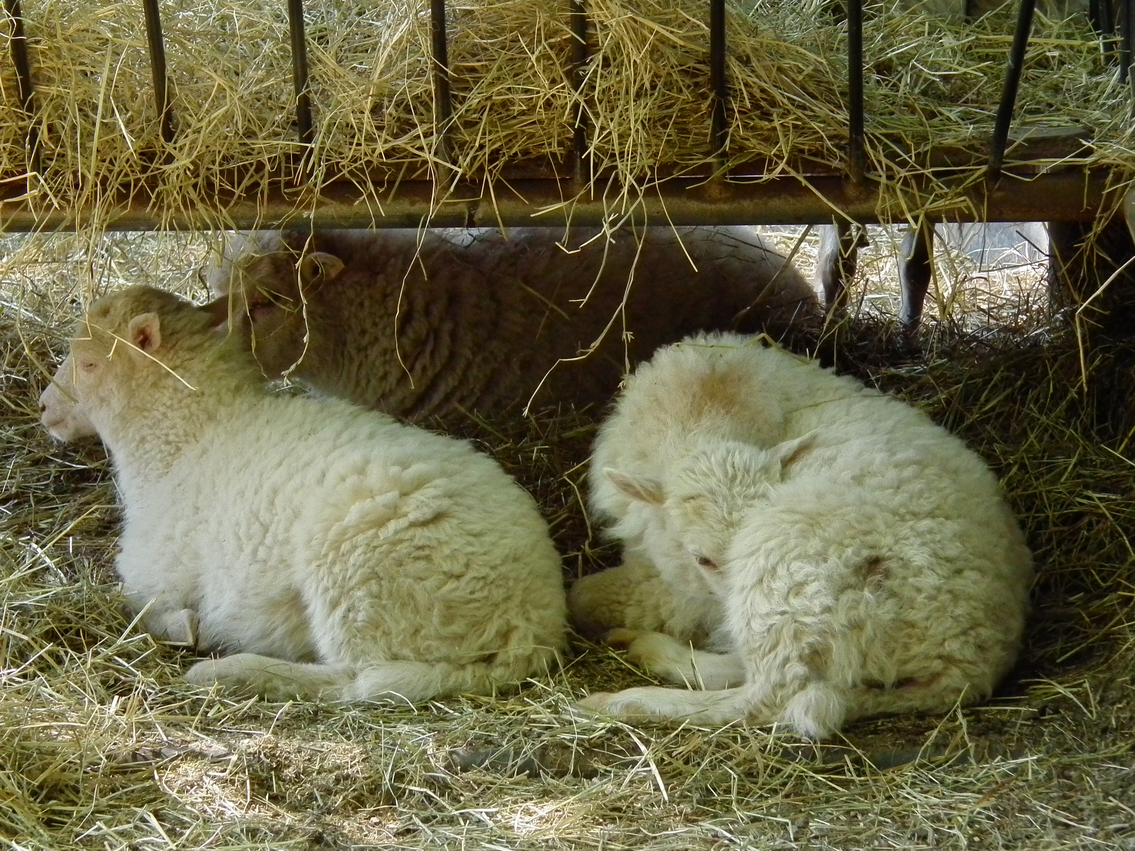 Skudde im Bergtierpark in Erlenbach (Hessen, Deutschland)